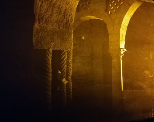 Holograma de campo profundo del interior de la iglesia pre-románica de Santa cristina de Lena (Asturias-España) realizado por investigadores del Centro de Investigación en Nanomateriales y Nanotecnología (CINN)